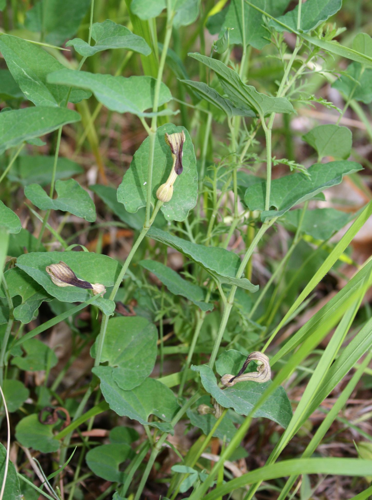 Aristolochia clusii, Osterluzeigewächse (Aristolochiaceae) - Italien/Italia/Italy: Kalabrien/Calabria, Prov. Reggio Calabria, Aspromonte, bei San Peri, SSE Scilla